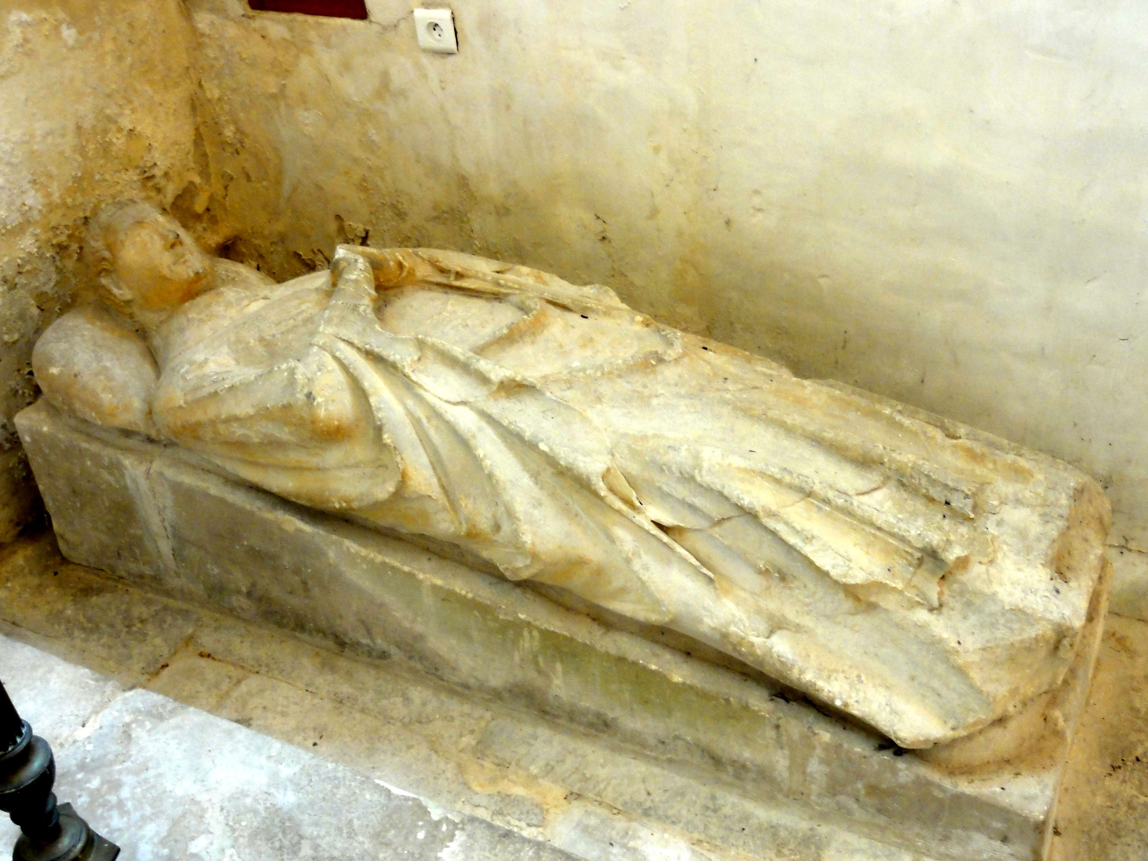 Gisant du prieur de St Nicolas, devant le chevet de la chapelle sud.